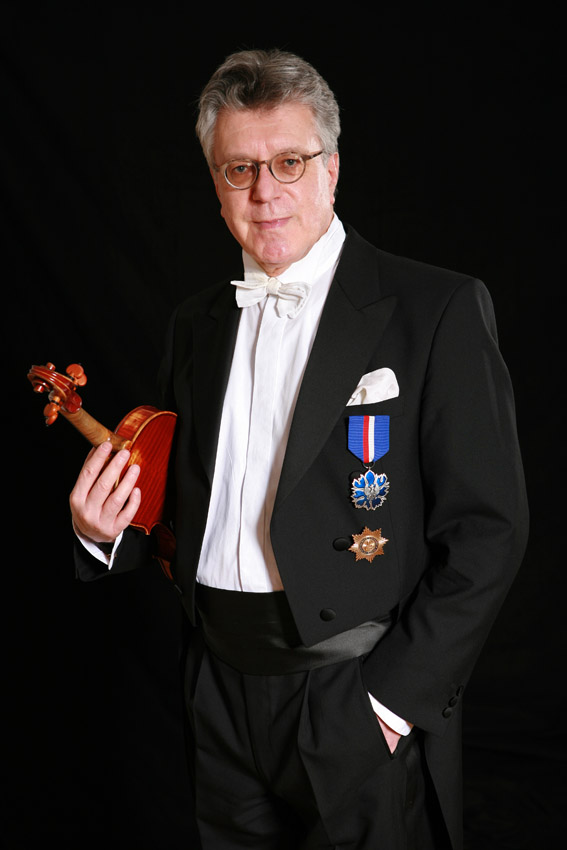 Portrait Michael Stricharz